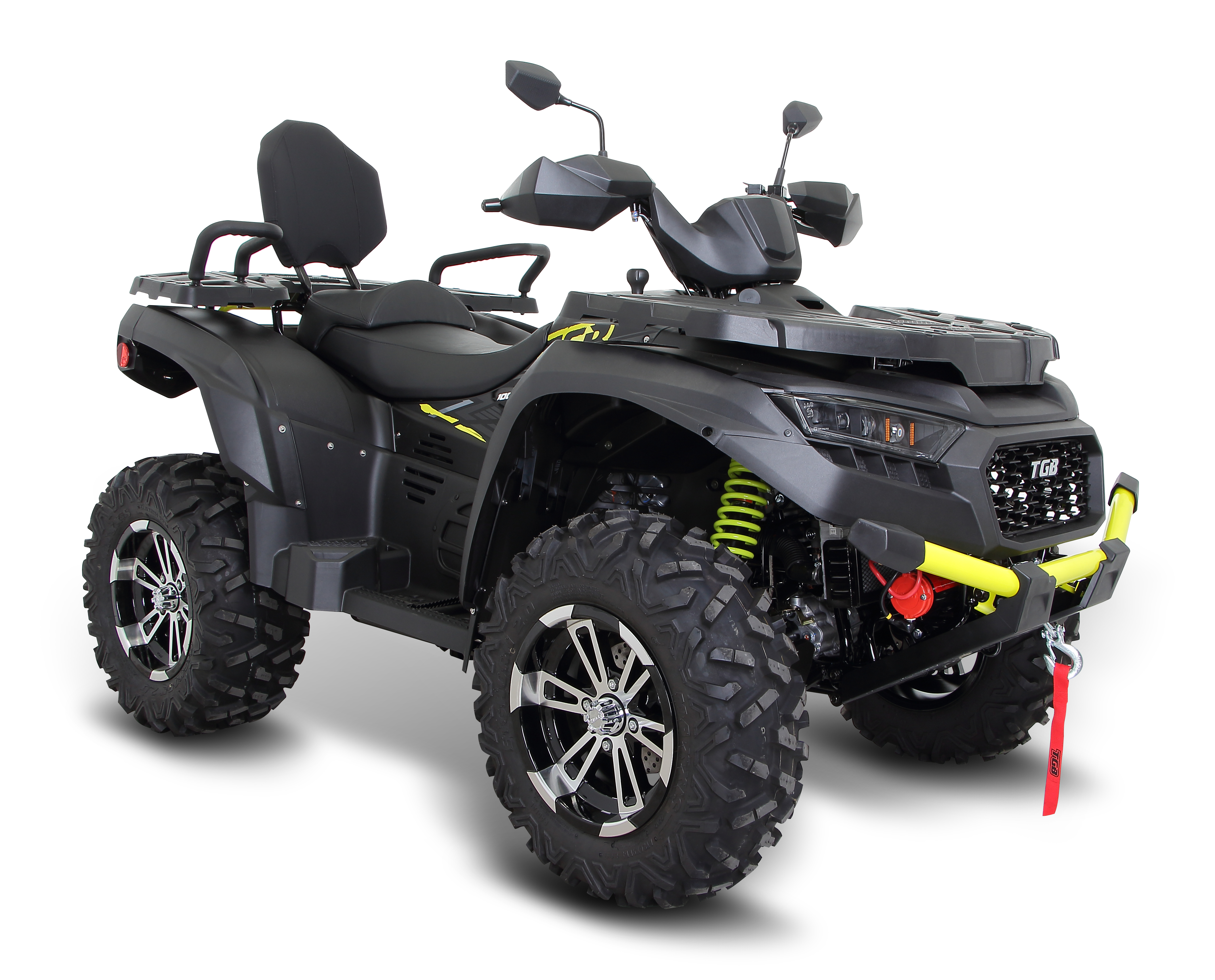 QUAD TGB 1000 LTX